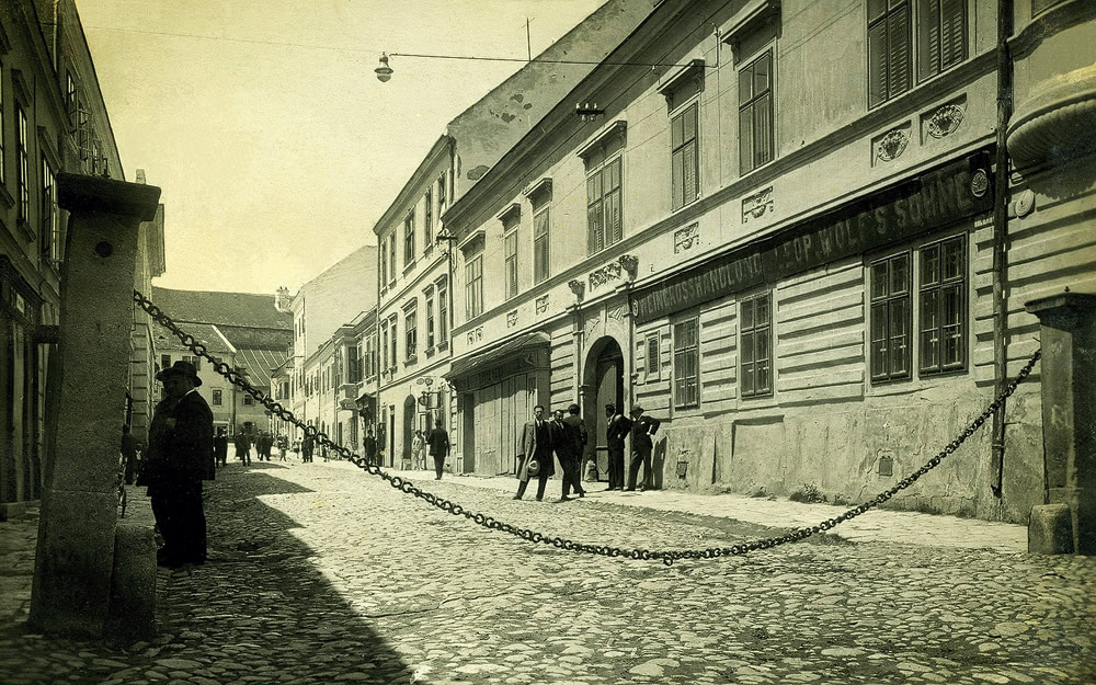 Unterbergstraße mit Wertheimerhaus der Firma Leopold Wolf’s Söhne in Eisenstadt, im Vordergrund Ghettopfeiler mit Kette